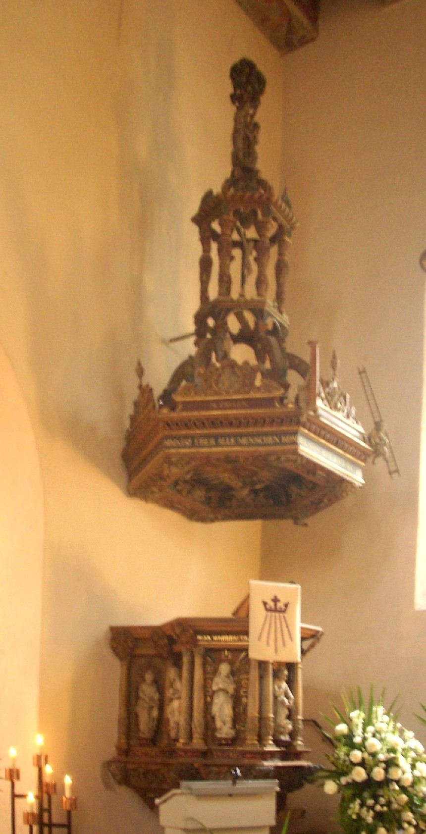 Nordenham-Blexen, ev.-luth. St.-Hippolyt-Kirche, Kanzel